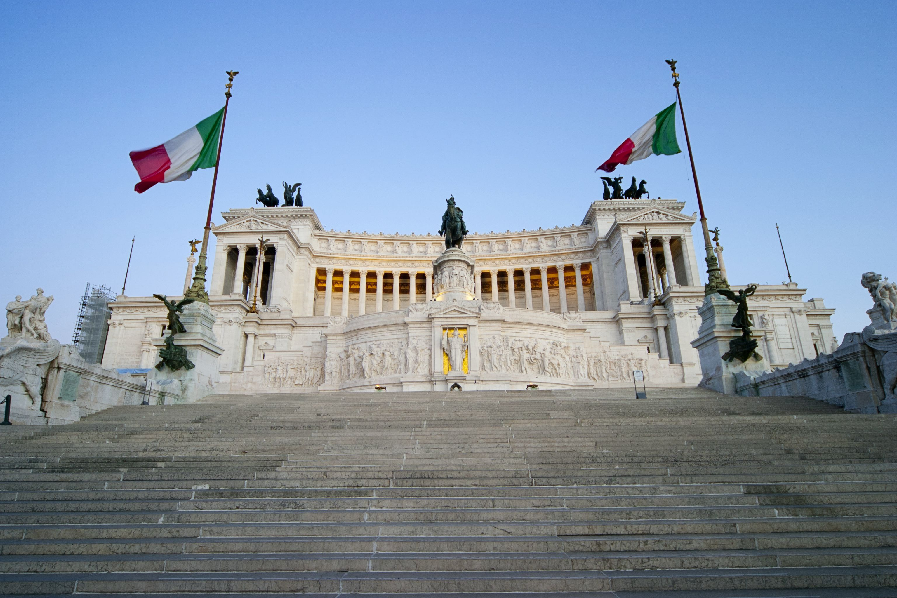 Rione II Trevi, 00187 Roma, Italy